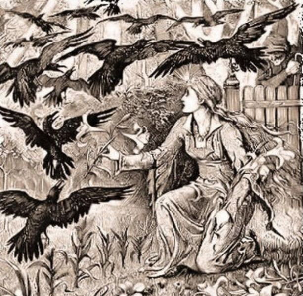 Contos de Grimm: Os Doze Irmãos